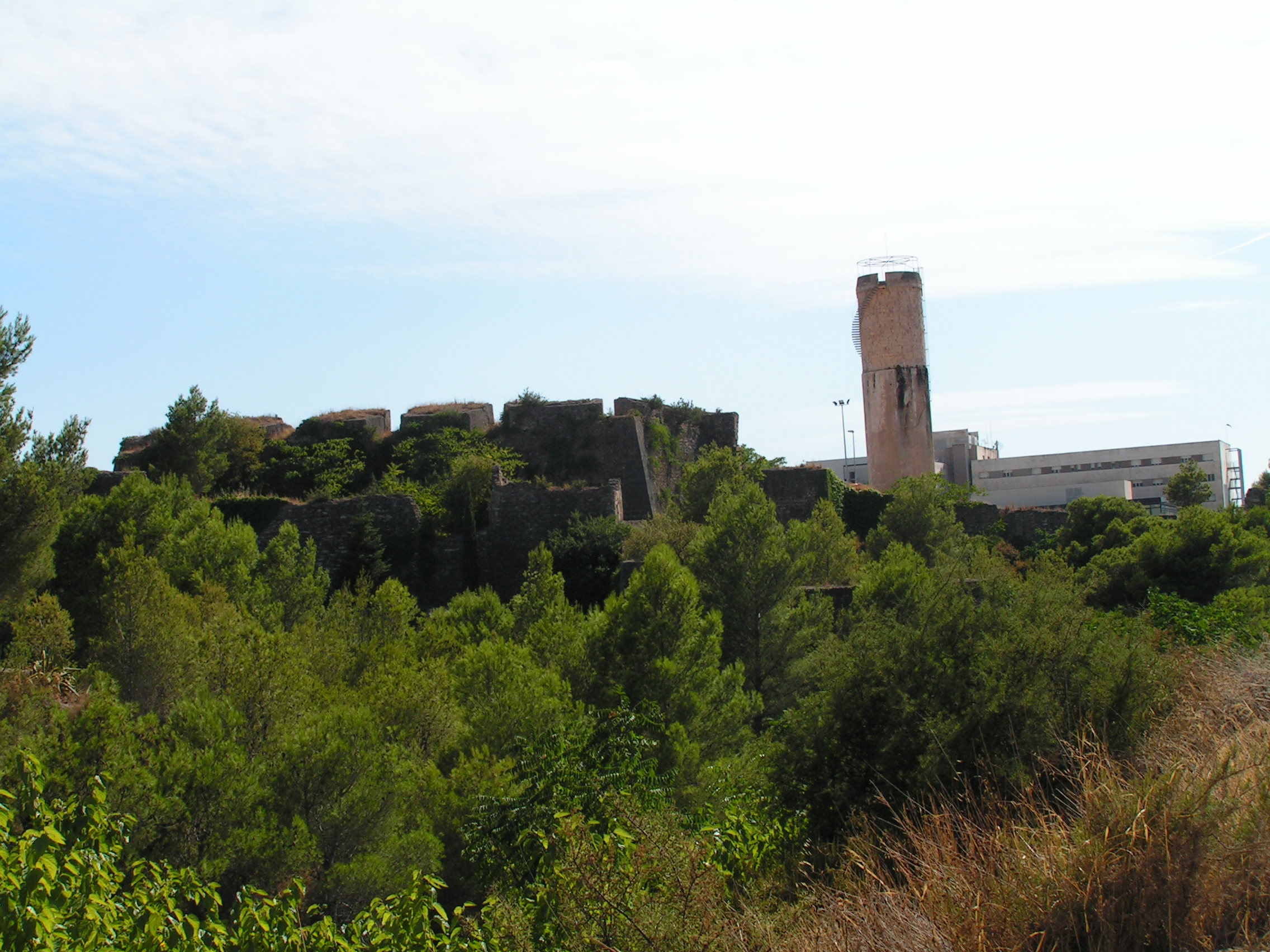 Baluard de la Victòria i HTVC